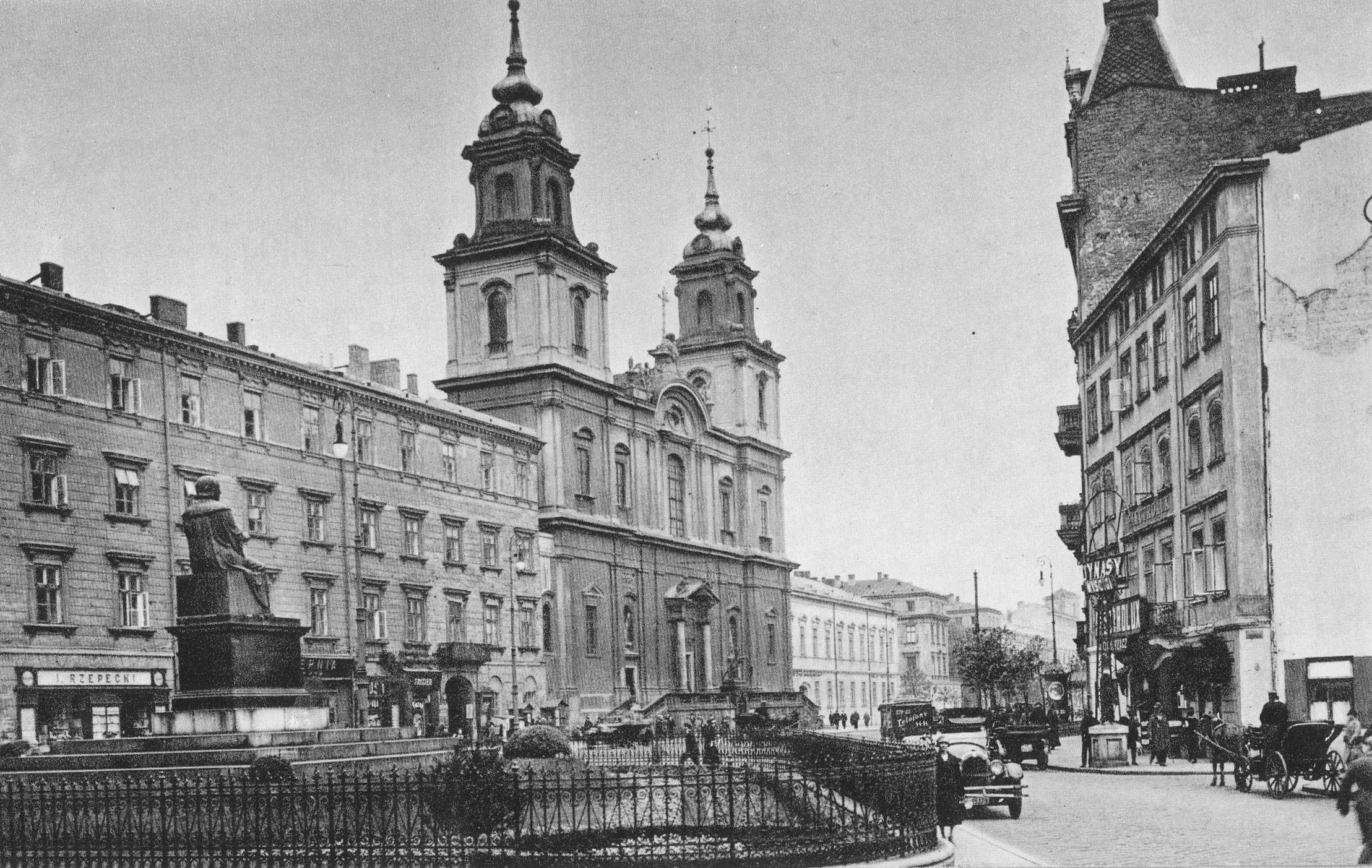 Pomnik Mikołaja Kopernika i kościół św. Krzyża w Warszawie